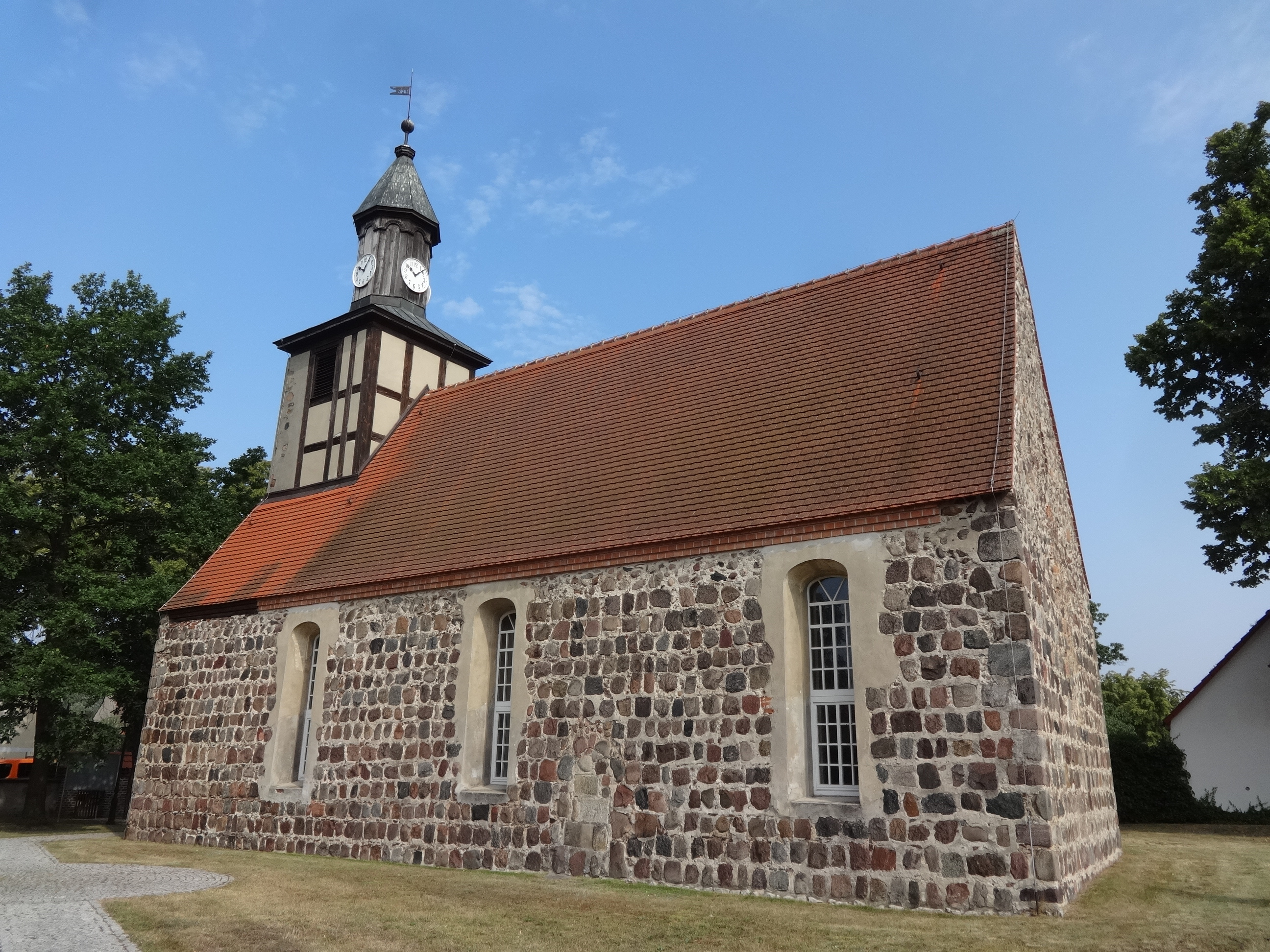 Die Feldsteinkirche in Glasow (Blankenfelde-Mahlow, Brandenburg) entstand in der zweiten Hälfte des 13. Jahrhunderts und wurde barock überformt. Im Innern befindet sich eine schlichte, bauzeitliche Ausstattung sowie eine Schnitzfigur aus der ersten Hälfte des 18. Jahrhunderts, die Johannes den Täufer darstellt.